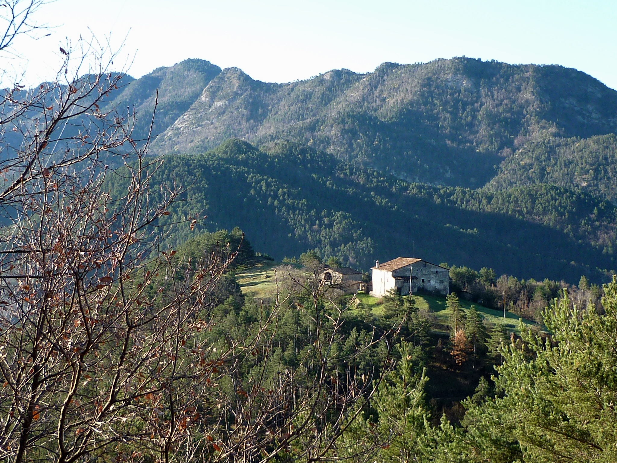 La masia del Bancell destaca sobre el verd fons del Serrat de la Questió, a les muntanyes de Travil